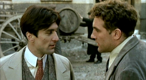 Screenshot del film Novecento (1976)